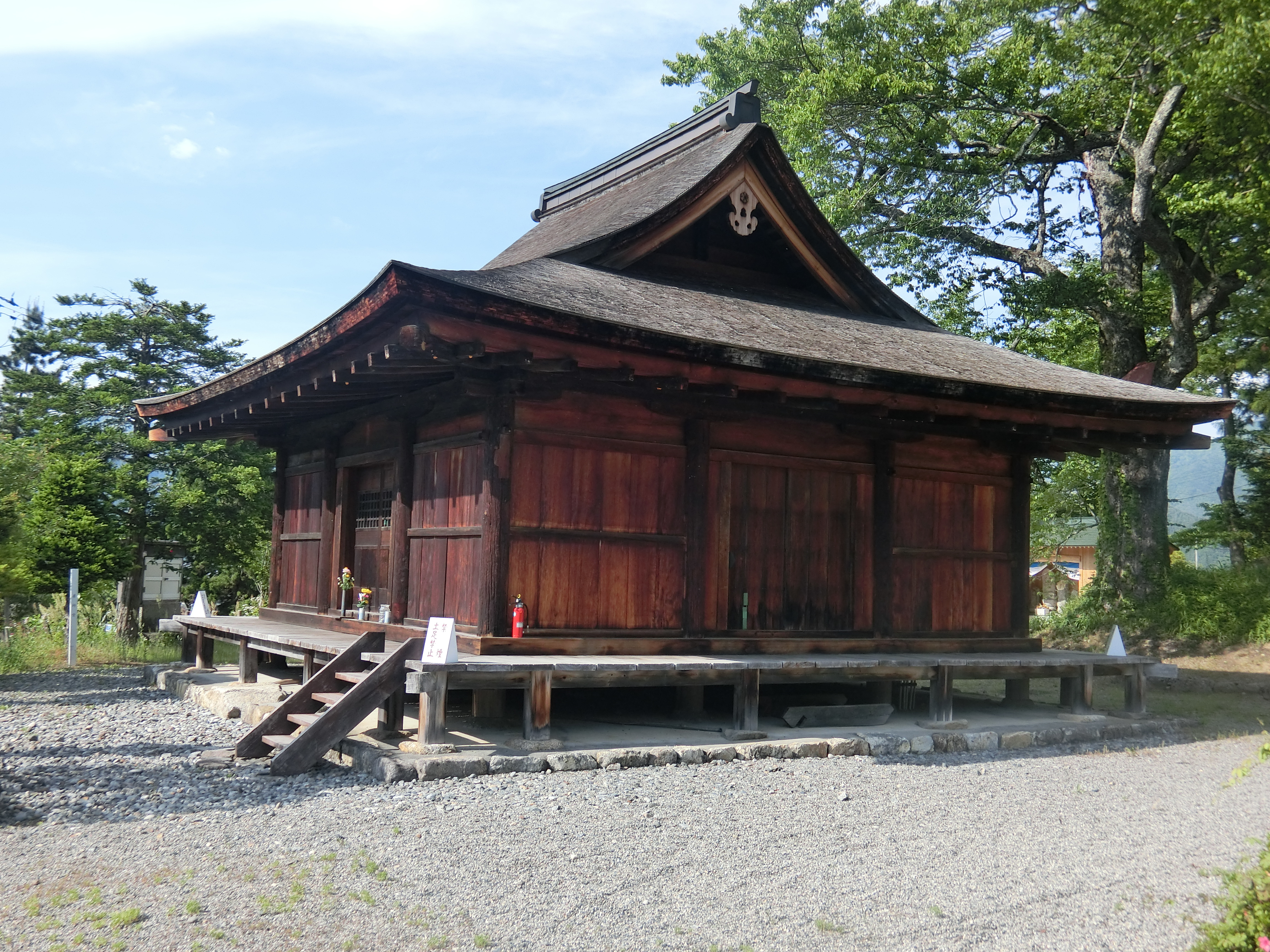 岐阜県飛騨市神岡町小萱にある瑞岸寺の薬師堂。国指定重要文化財